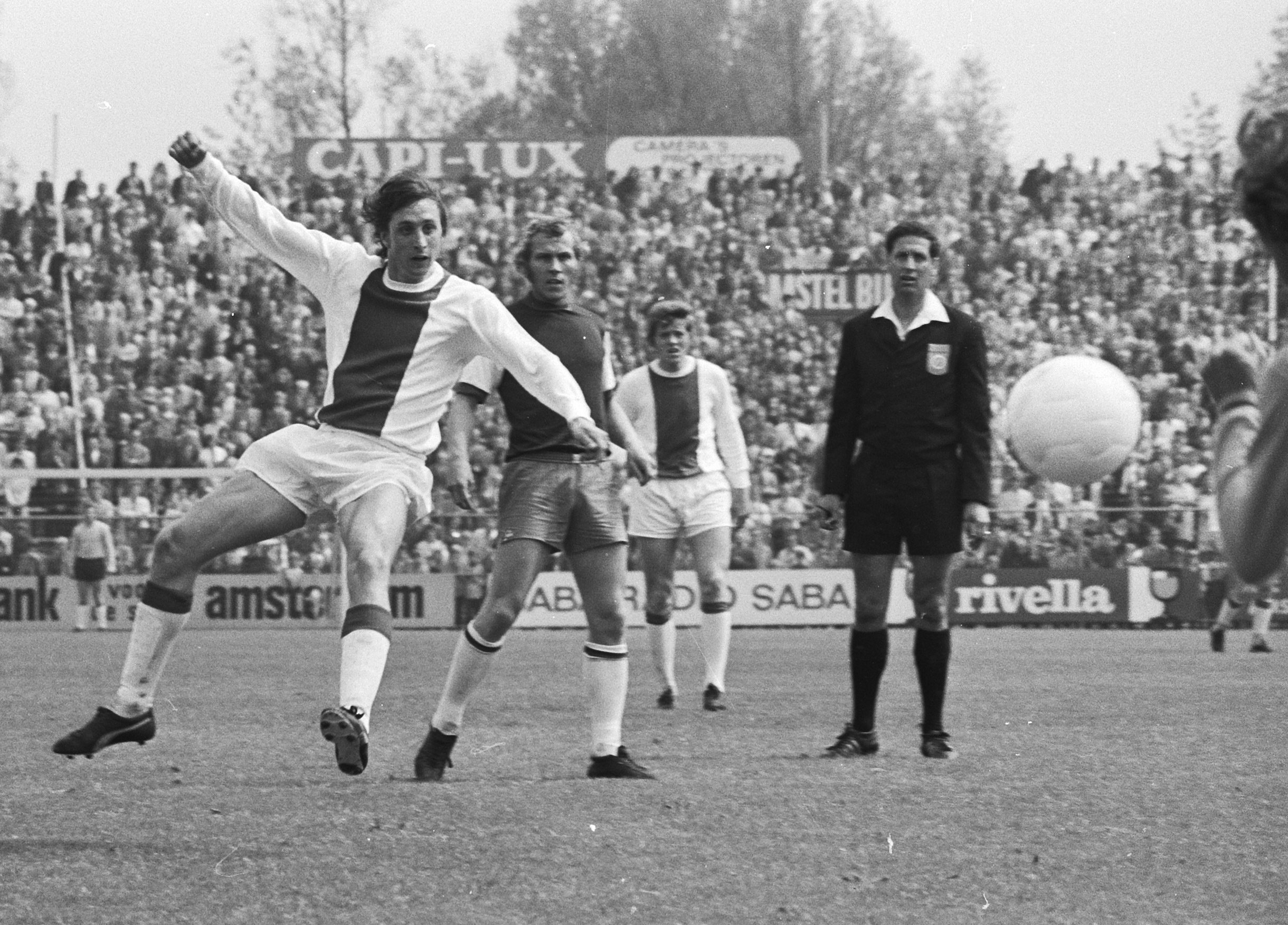 Johan Cruijff (Ajax) scoort tegen HFC Haarlem